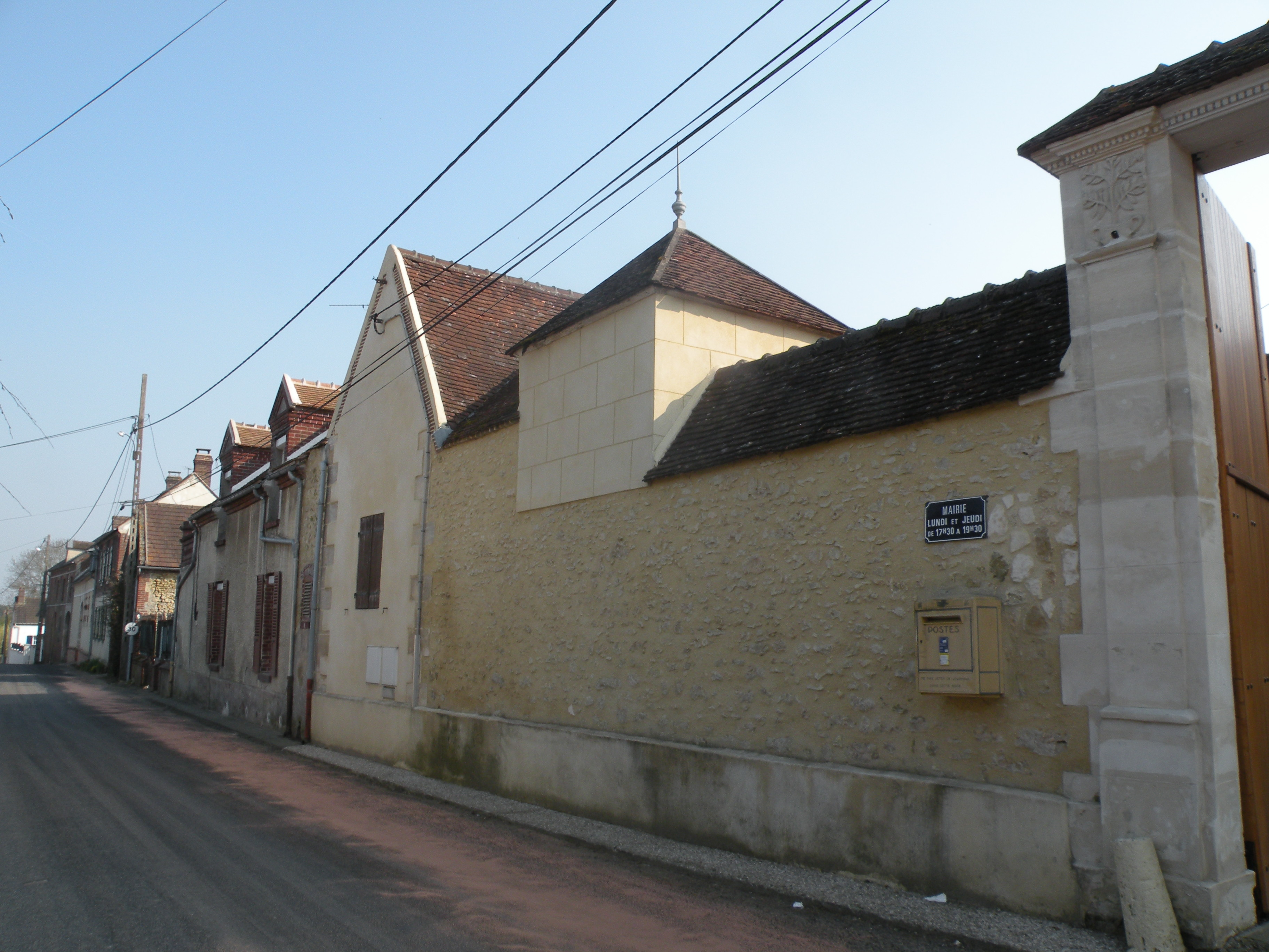 vue de la mairie de Montreuil-sur-Thérain depuis la rue